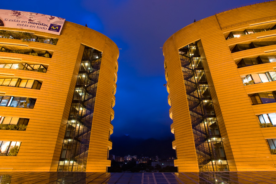 Fachada de Centro San Ignacio